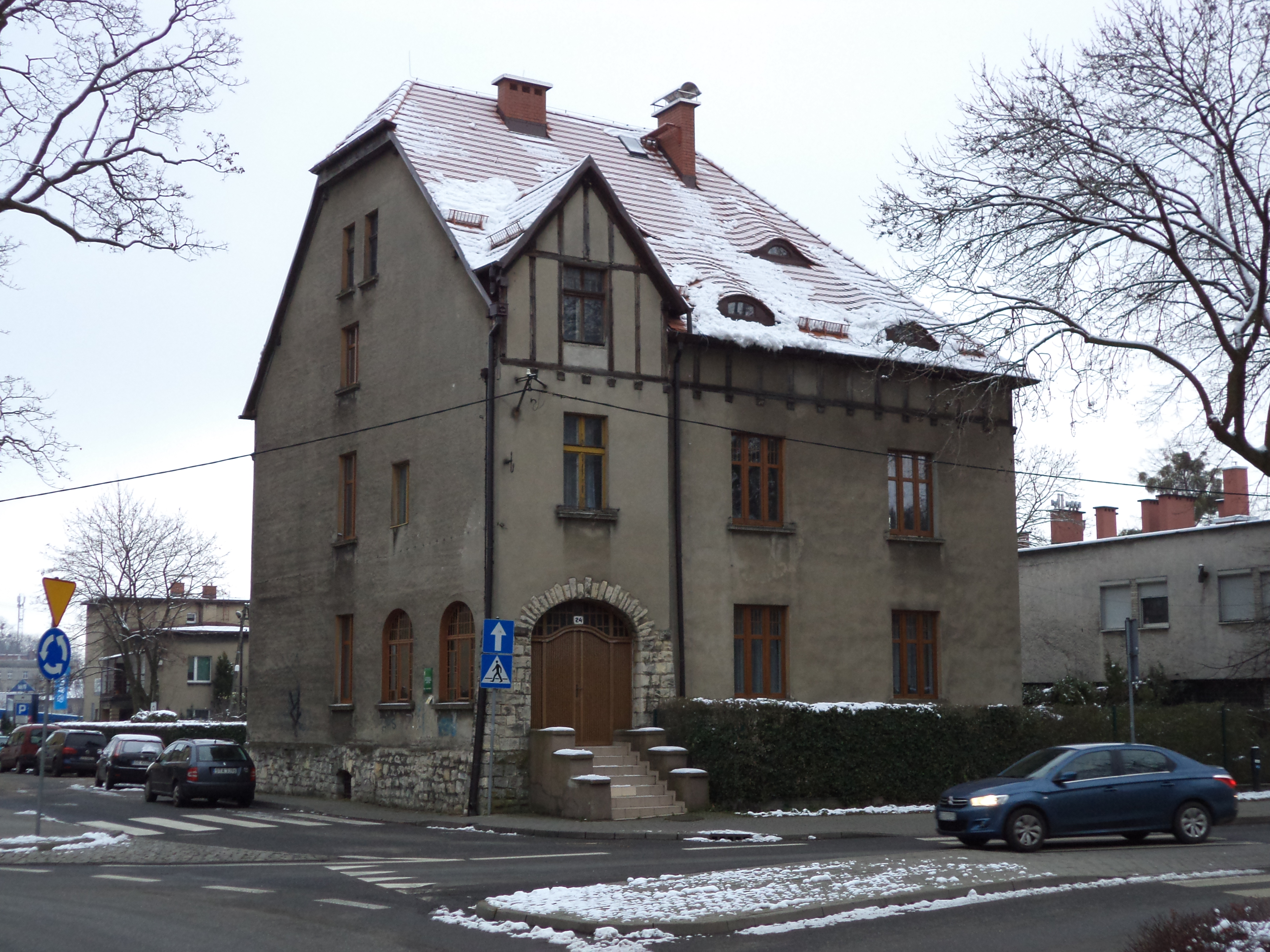 Budynek w miejscu dawnej Bramy Wrocławskiej przy ul. Gliwickiej 24 w Tarnowskich Górach